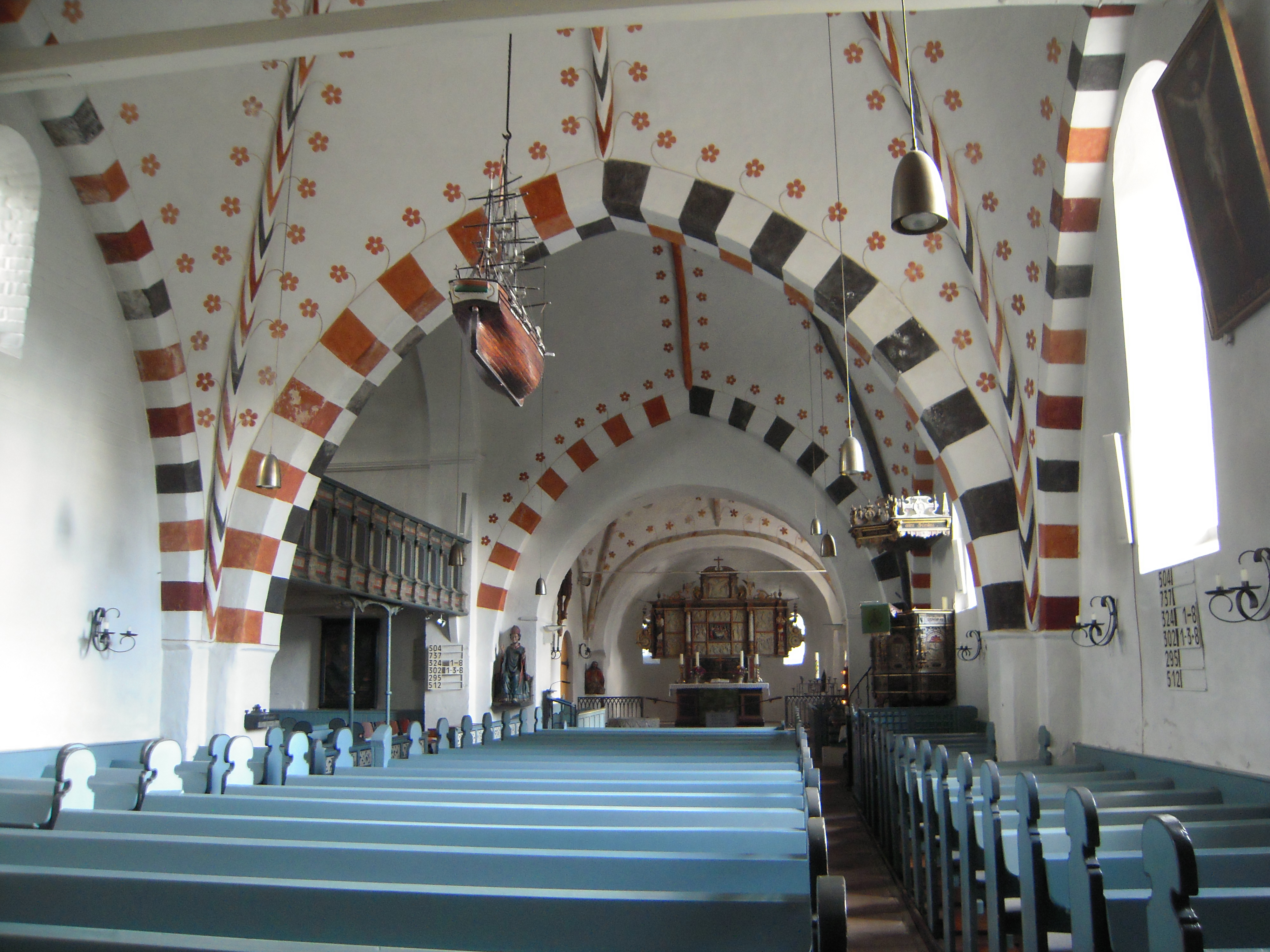 Innenraum der Kirche St. Nicolai in Wyk auf Föhr